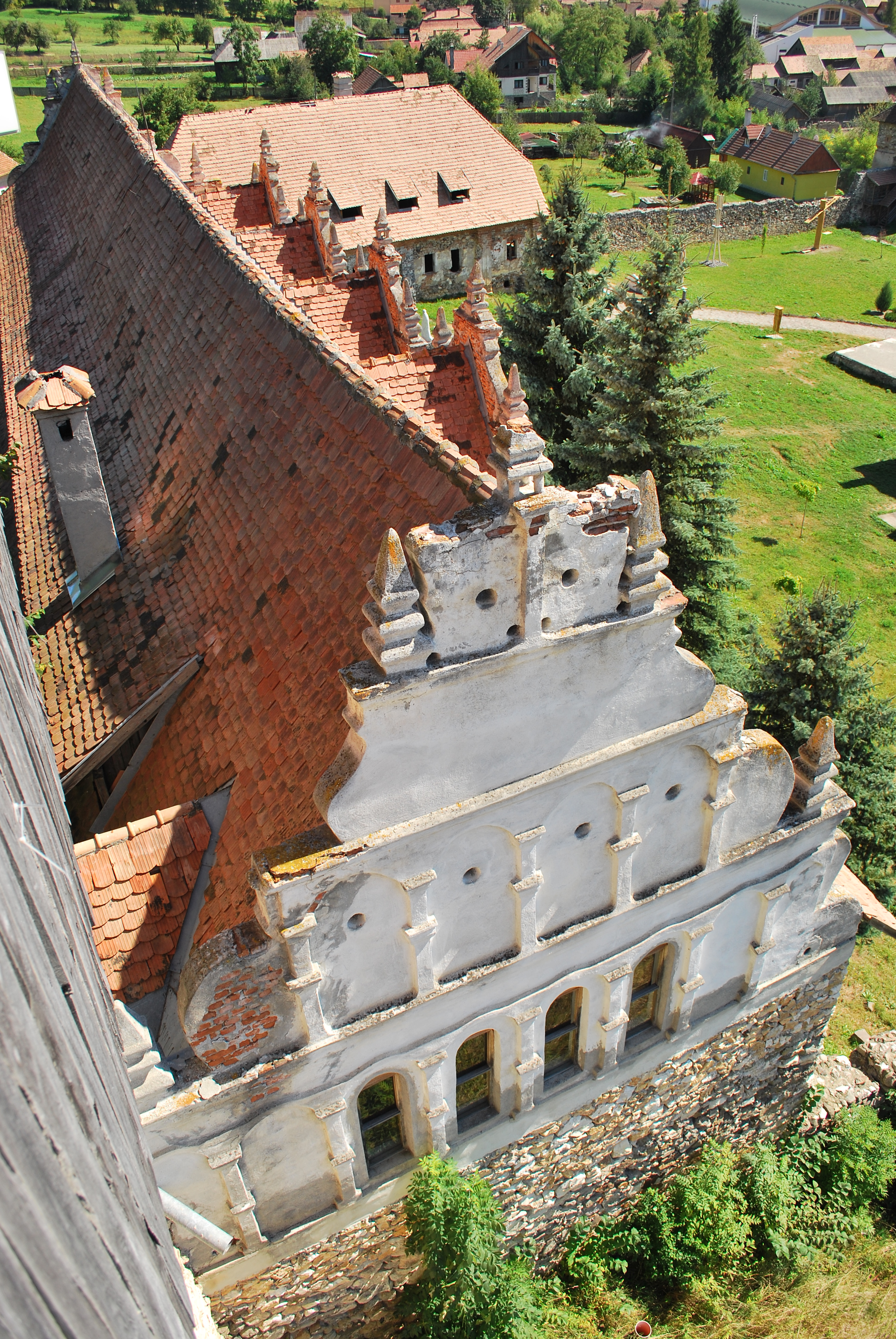 Cladirea Dietei 02